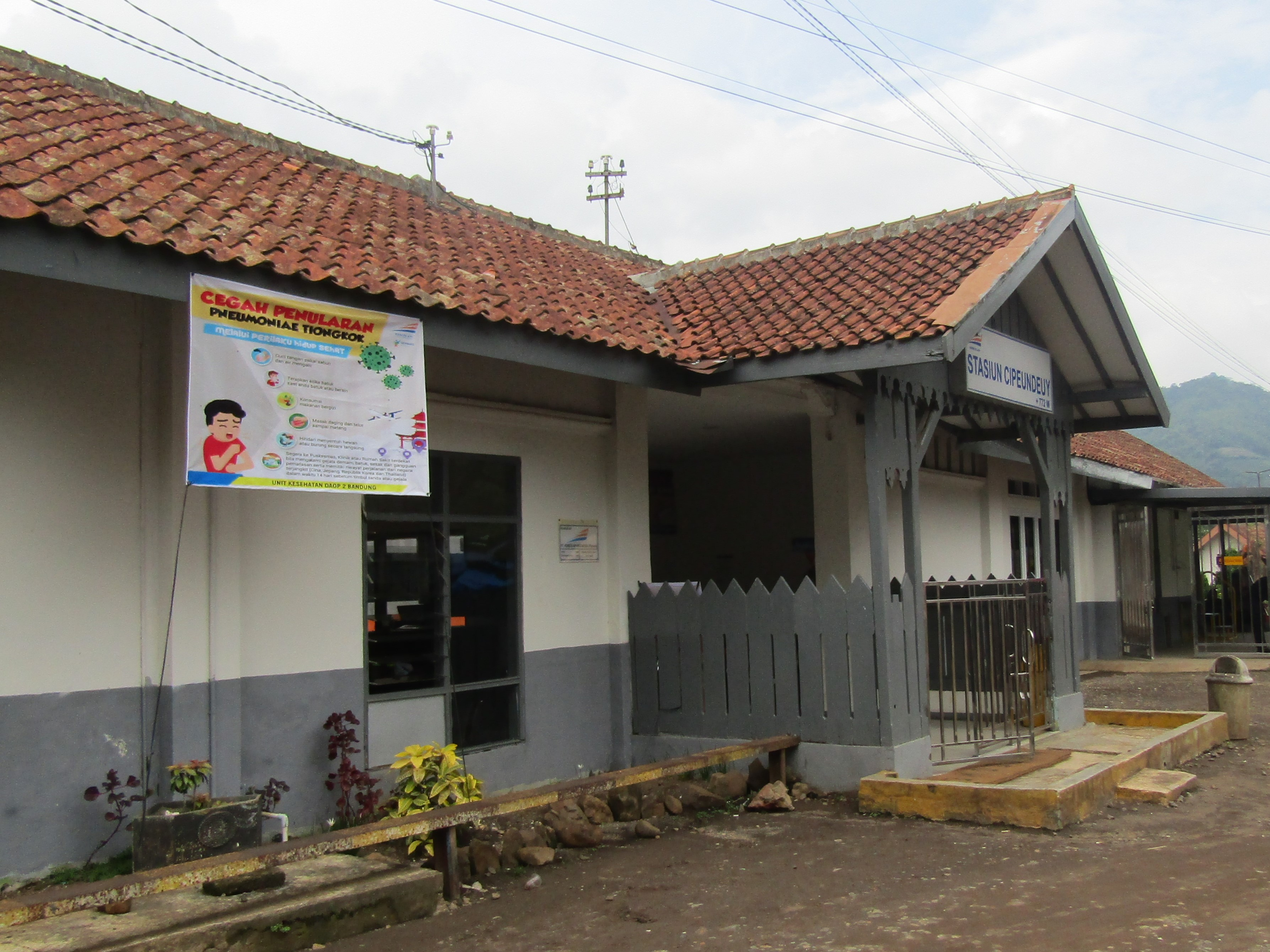 Bangunan utama Stasiun Cipeundeuy, 2020